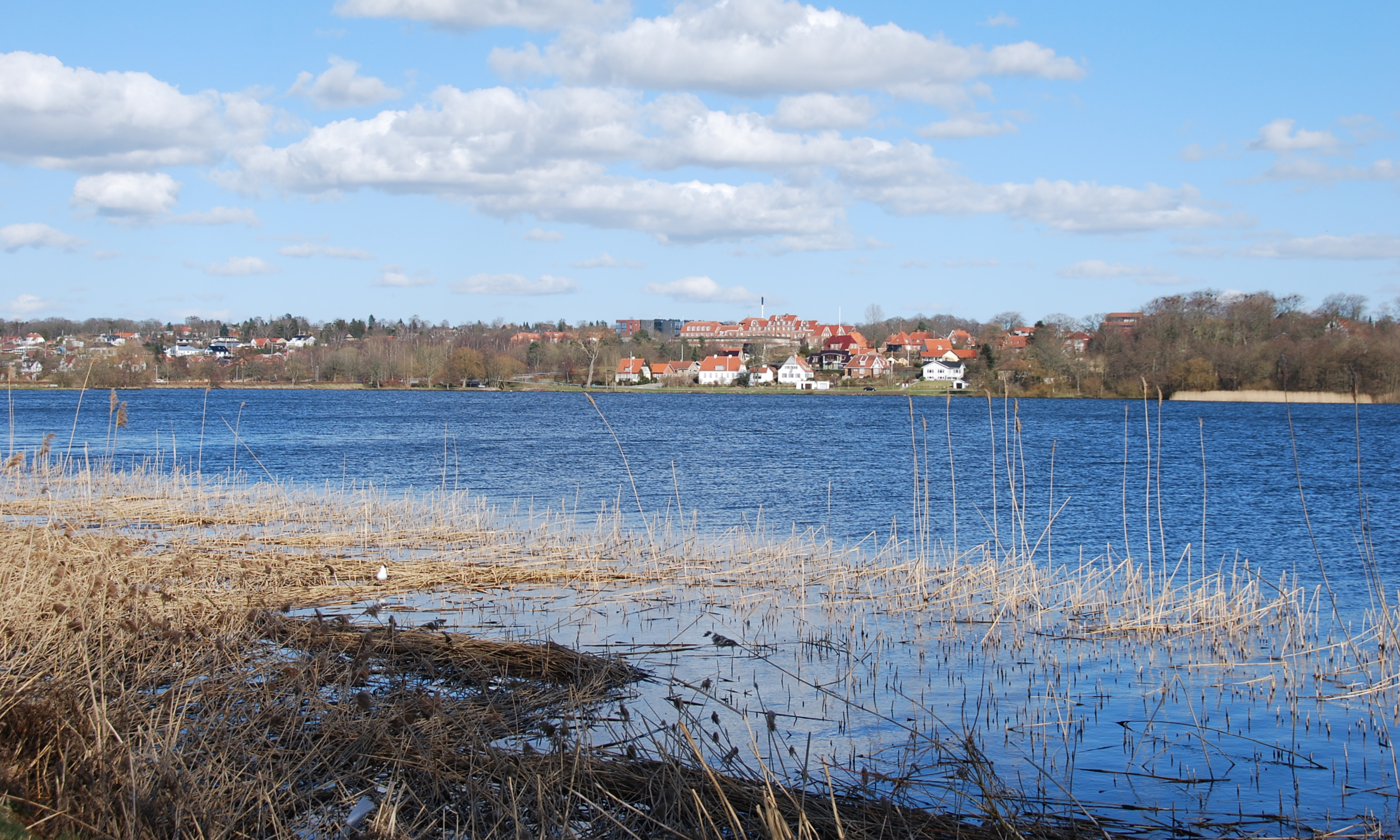 Udsigt til Asmild ved Søndersø i Viborg.